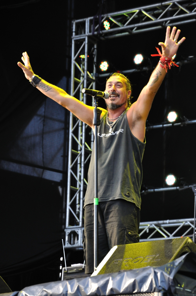 Kapanga - Cosquín Rock 2011